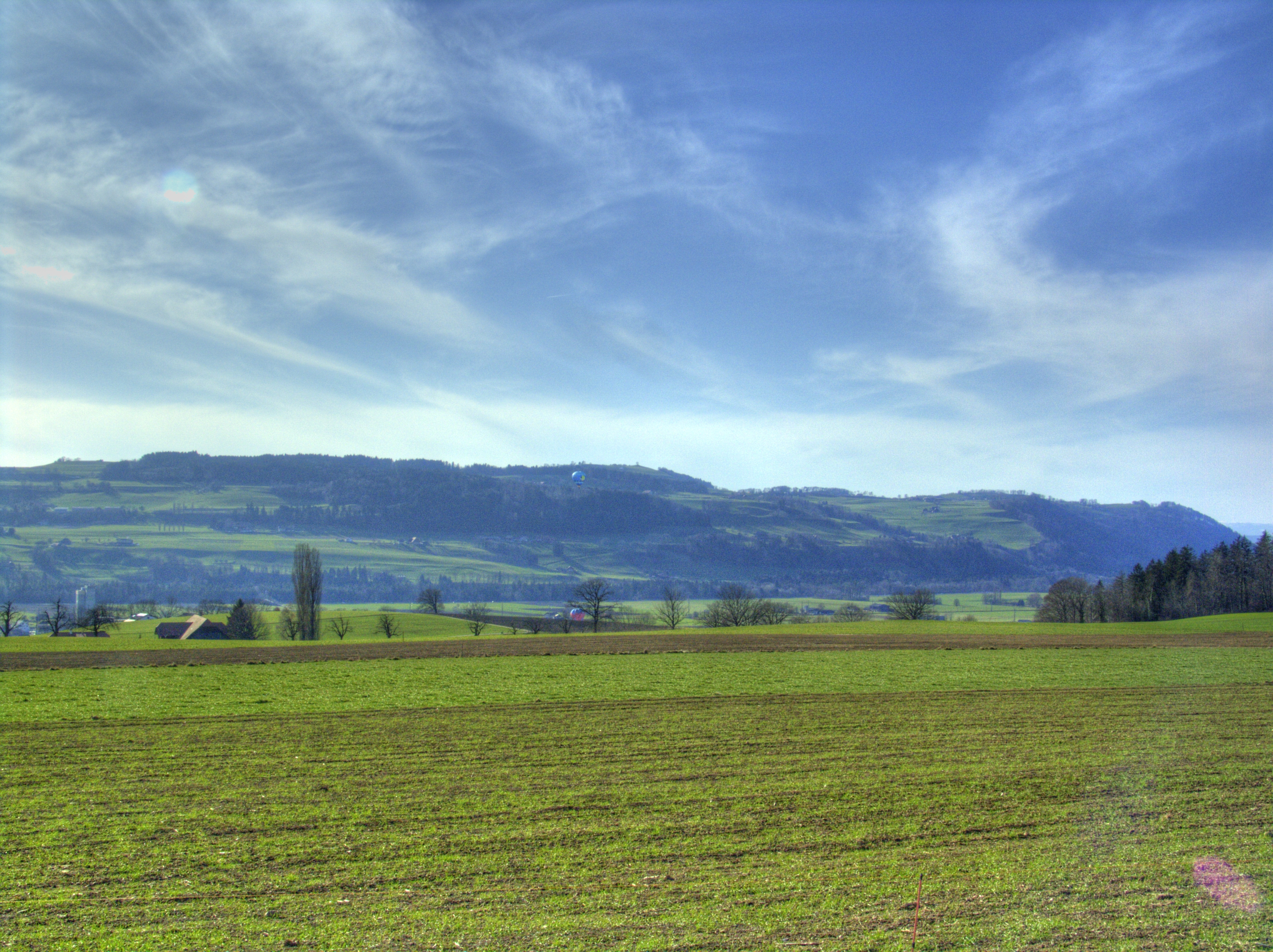 Aaretal